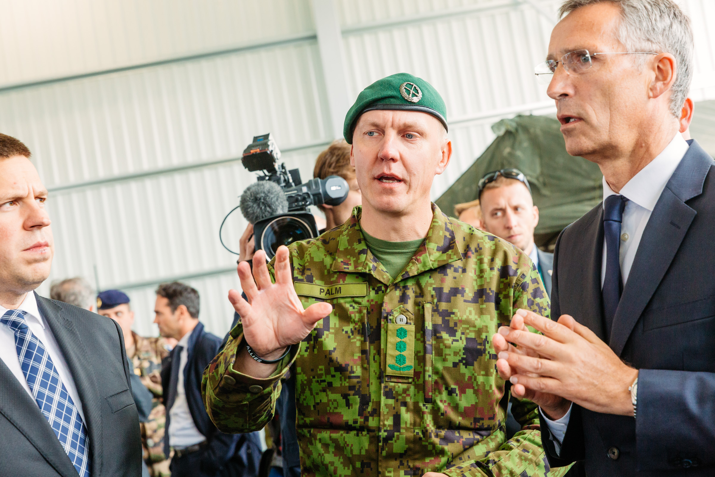 Kol Veiko-Vello Palm ja Jens Stoltenberg